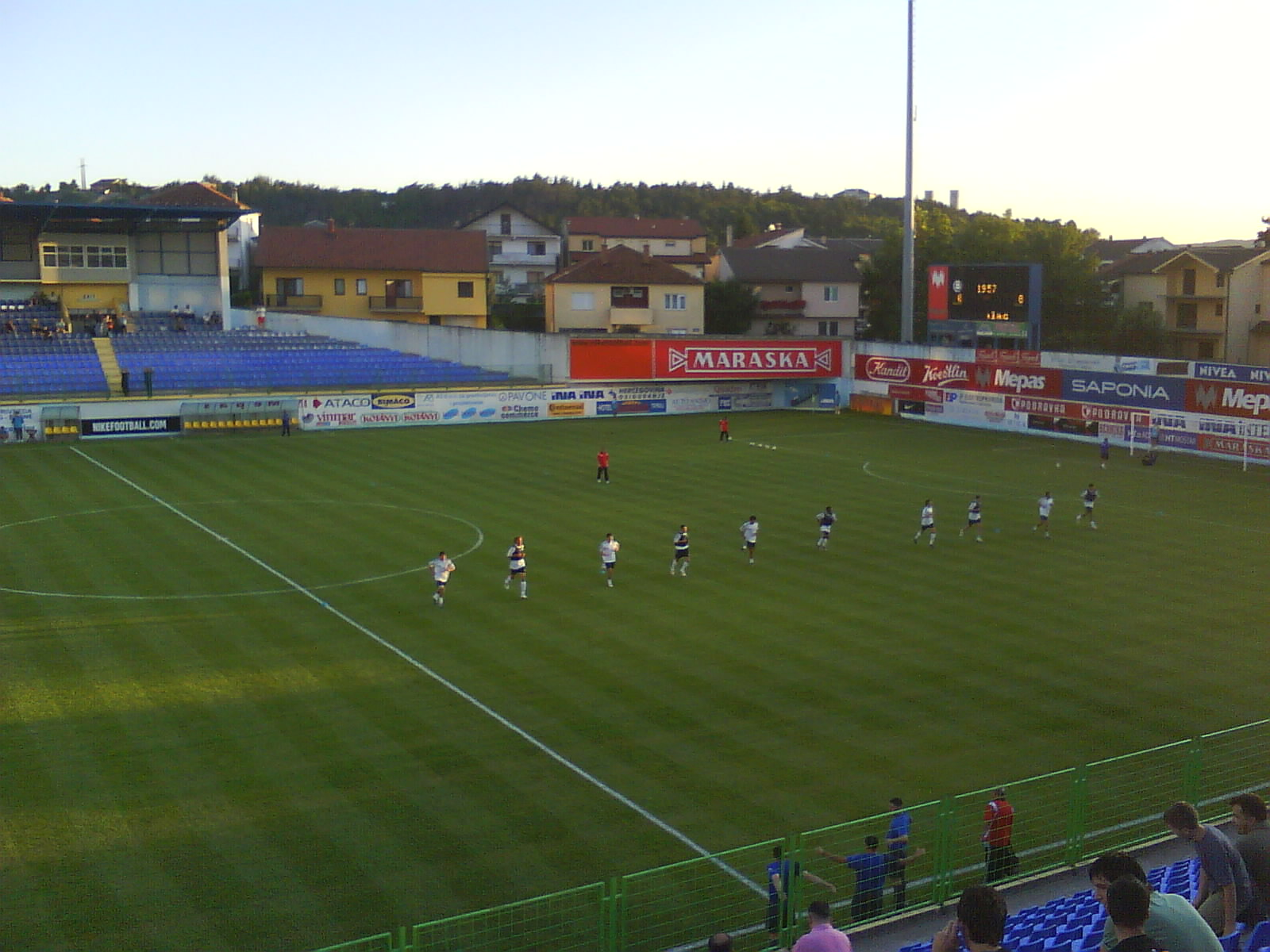 Pecara-utakmica Široki Brijeg-Banants